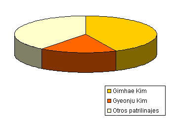 Figuras tomadas de Report on the Korean Surname and Its Origin (República de Corea, 1988) Vol. 1, pp 2-1343. (Buró Nacional de Estadística, Economic Planning Board)